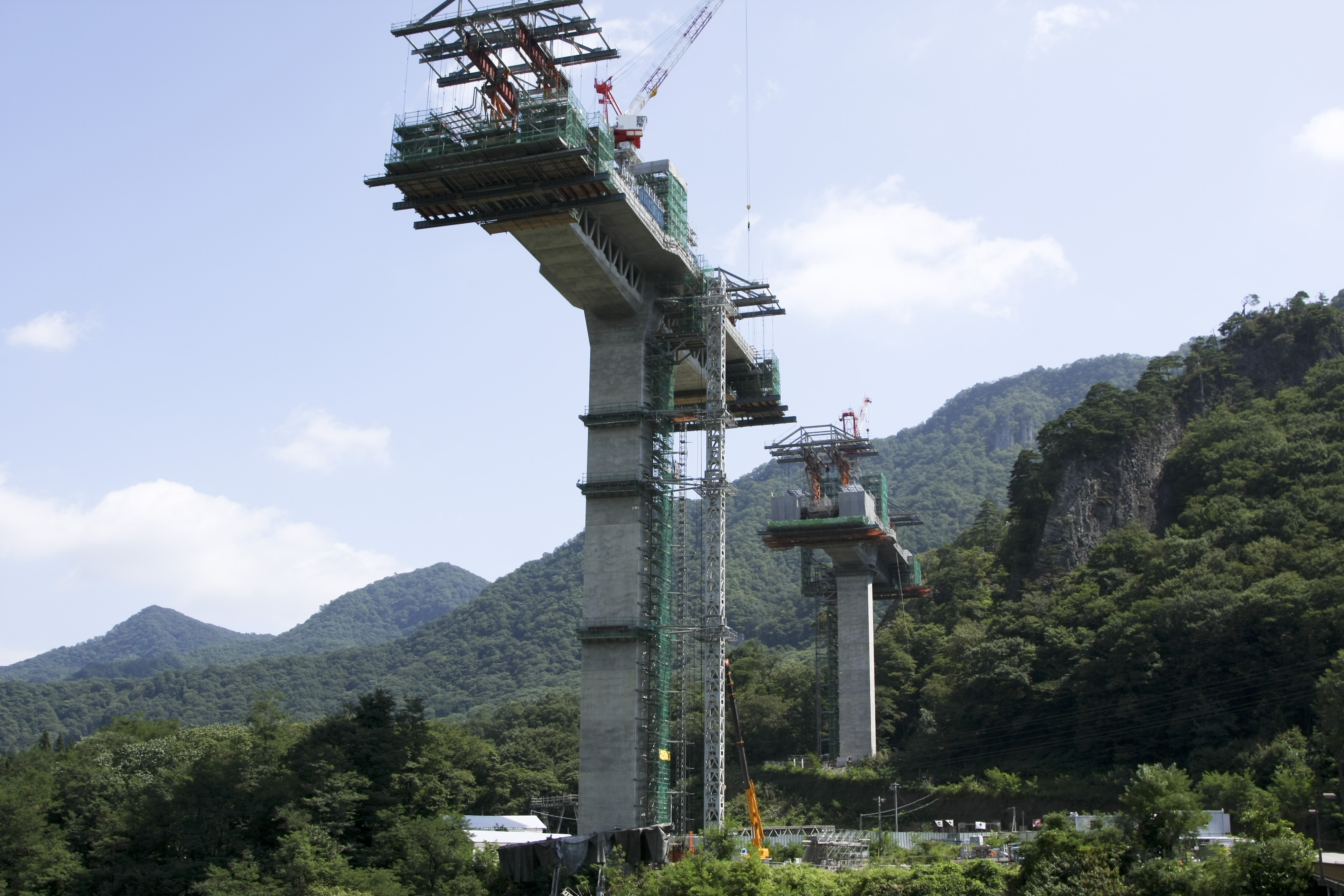 群馬県吾妻郡長野原町の八ツ場ダム建設地域にある八ツ場ダム湖第2橋脚。